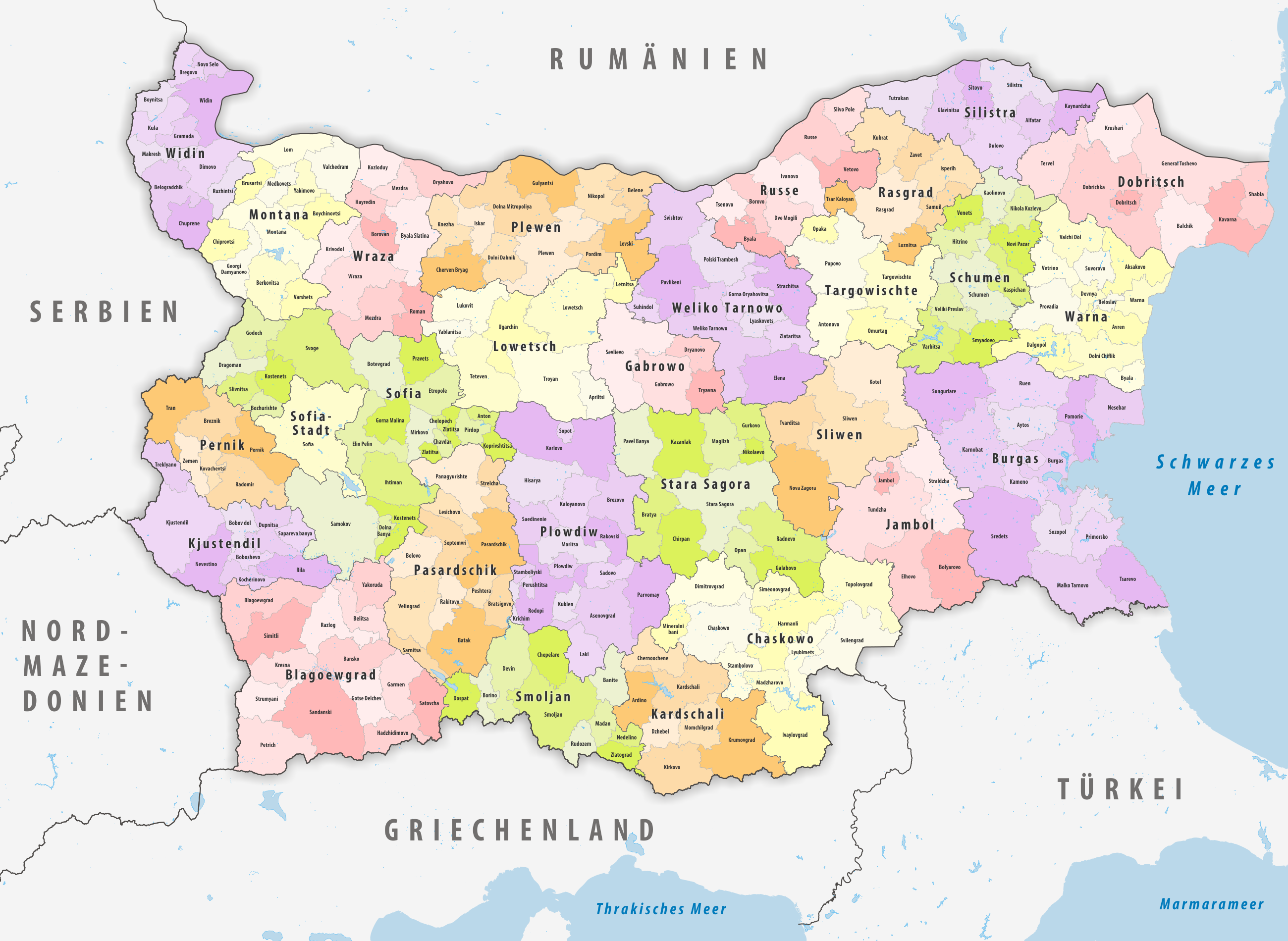 Bezirke und Gemeinden Bulgariens